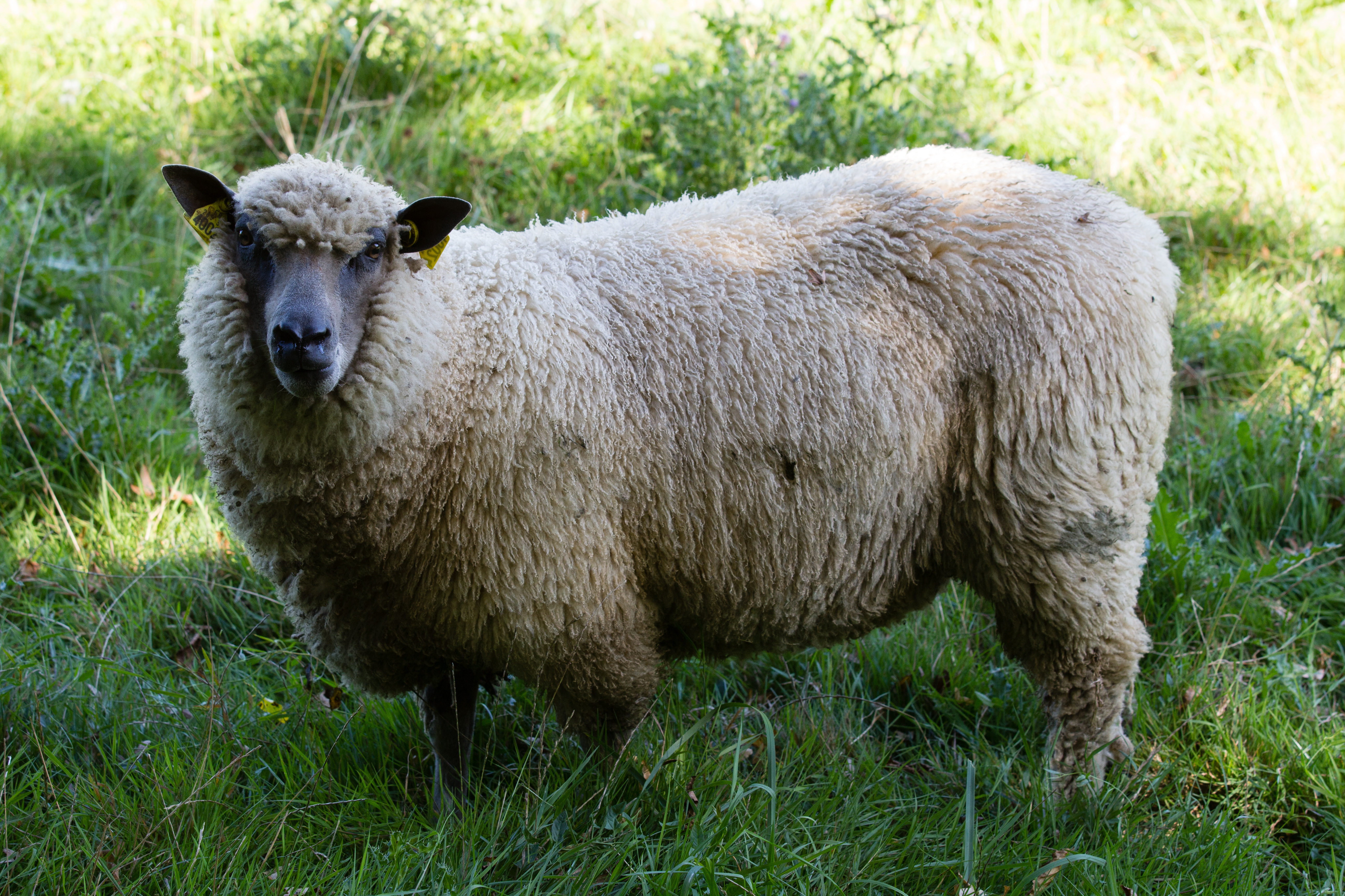 Mouton bleu du Maine à l'Écomusée du pays de Rennes.